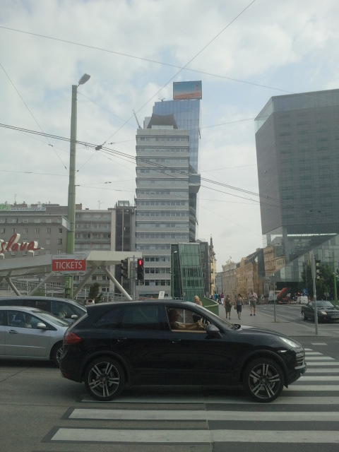 Hauptgebäude der Verlagsgruppe News